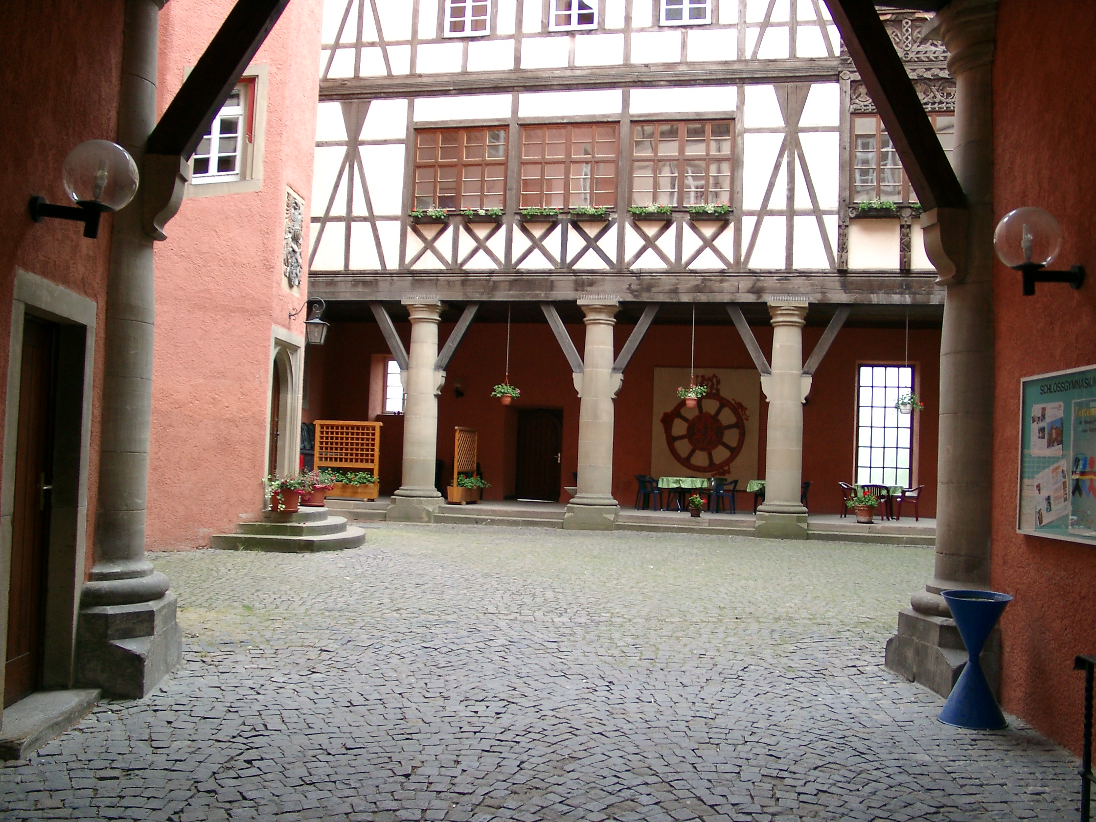 Innenhof des Schlosses von Künzelsau